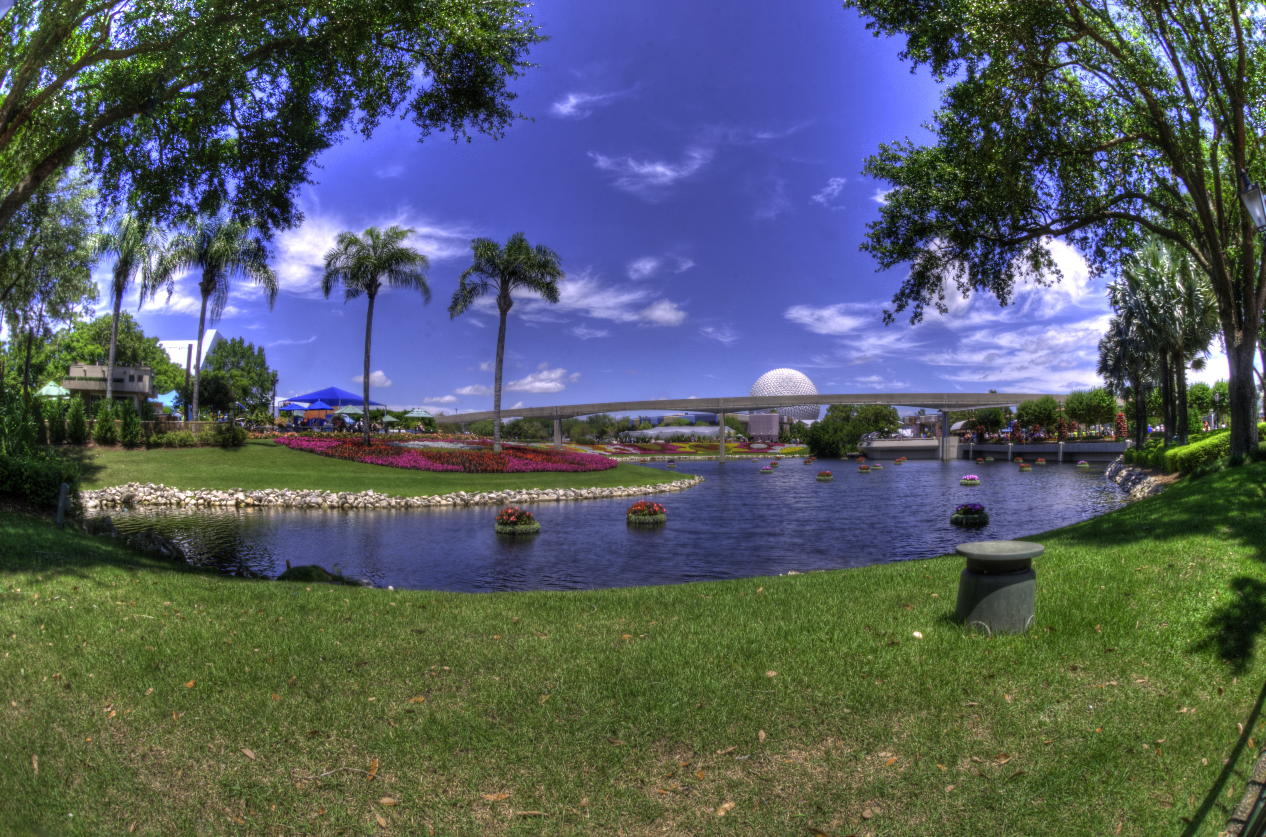 EPCOT